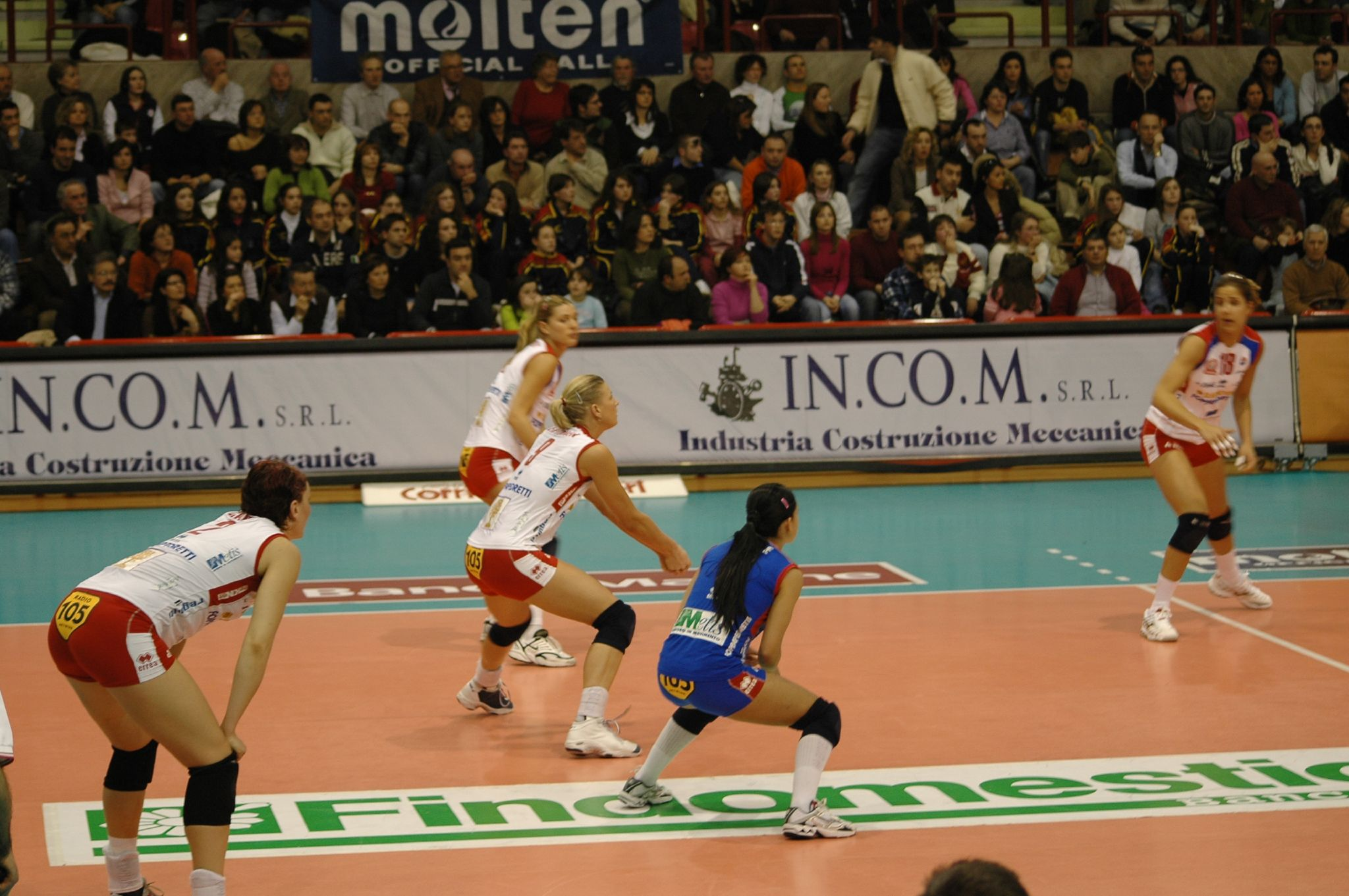 Volley Bergamo in ricezione